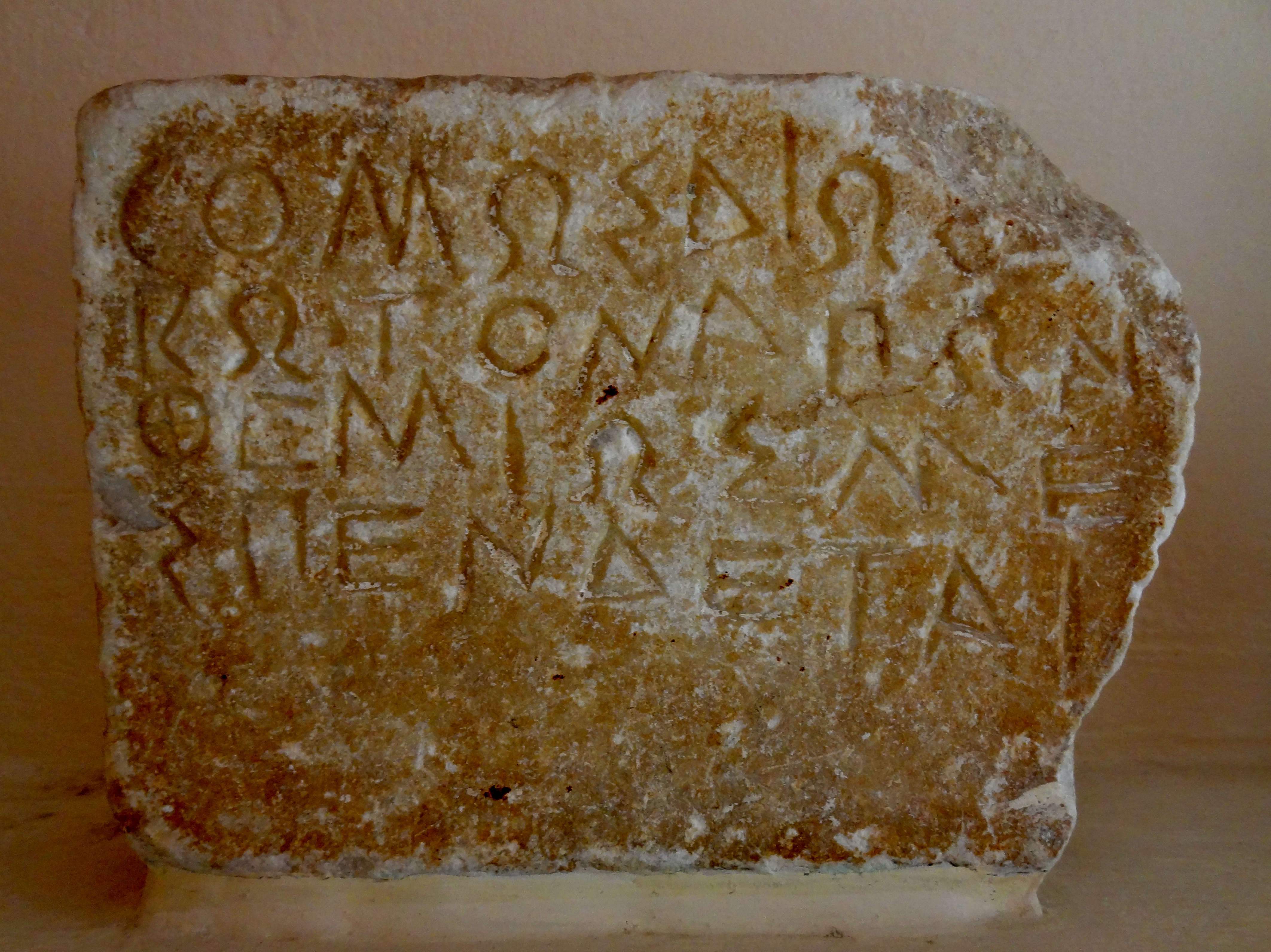 Teil einer archaischen Inschrift (ca. 490 v. Chr.) im Archäologischen Museum von Parikia auf Paros, Kykladen, Griechenland